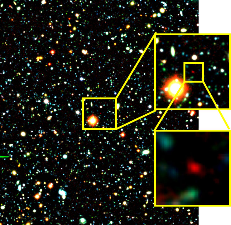 IOK-1